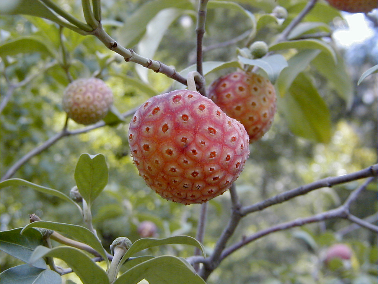 Cornus capitata, fruto. Real Jardín Botánico de Madrid.